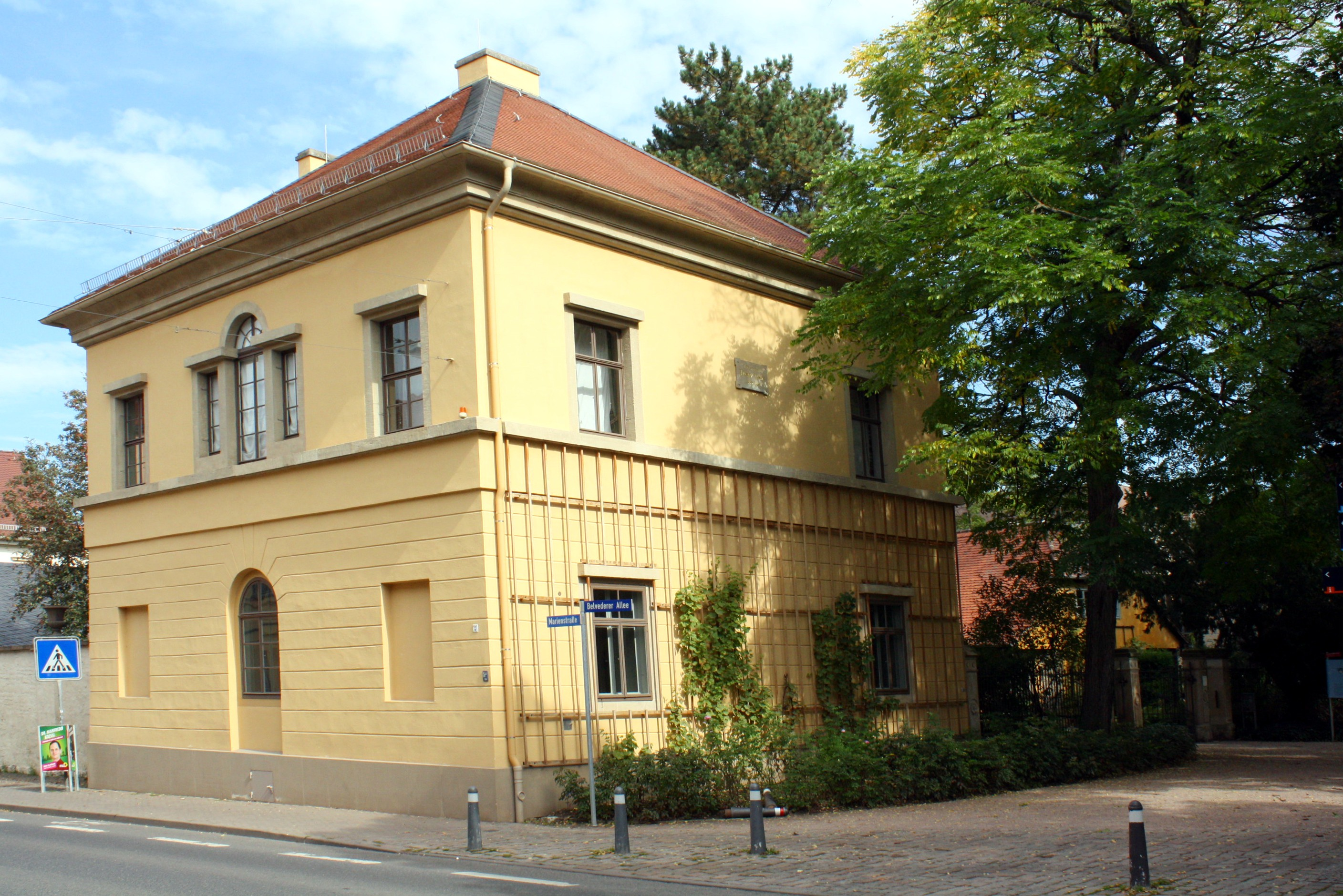 Liszthaus in der Weimarer Marienstraße 17